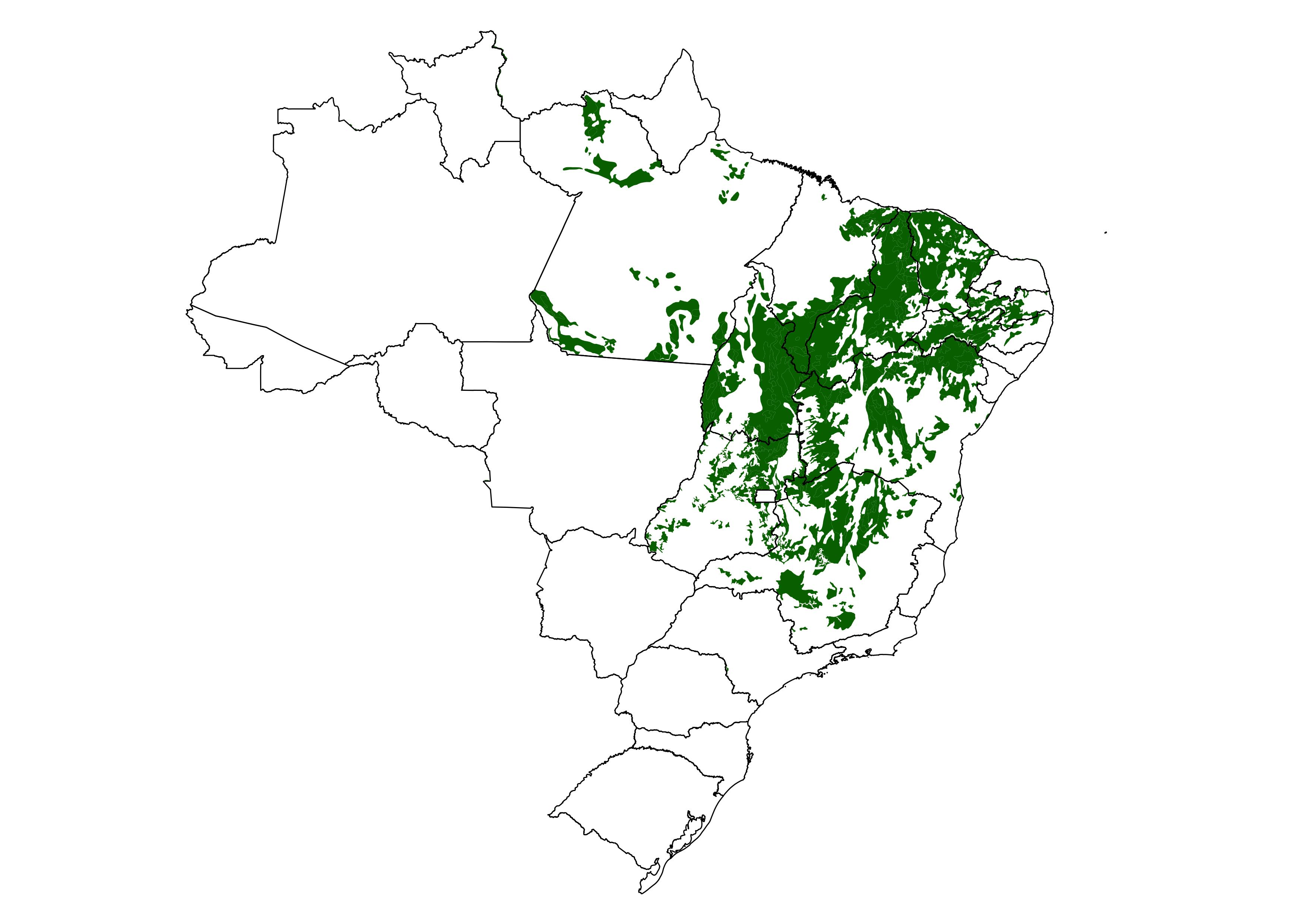 Distribuição da Espécie de planta: Callisthene microphylla, No Brasil, de acordo com a REFLORA em 08/04/2017